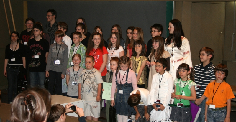 SFeraKon, Zagreb